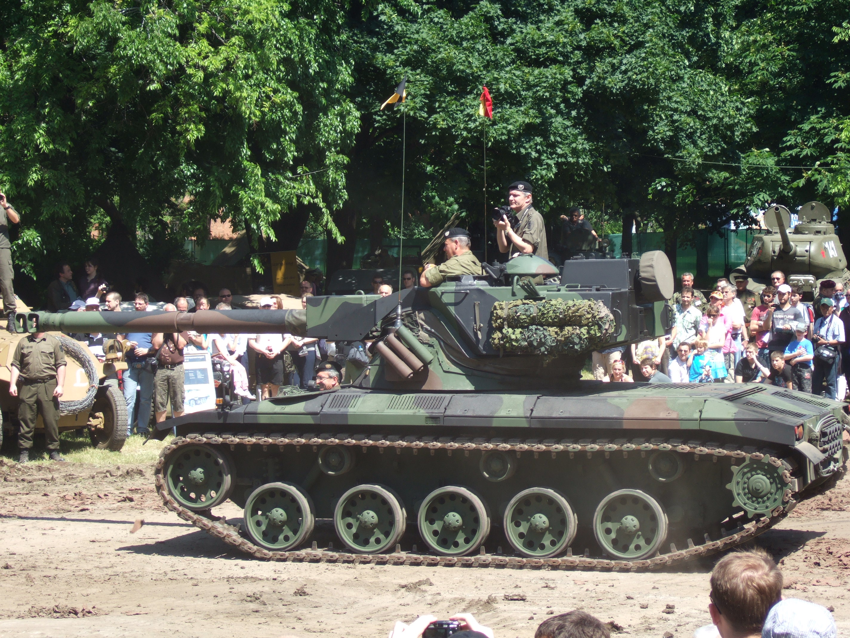 Jagdpanzer Kürassier des Heeresgeschichtlichen Museums (HGM) bei einer Vorführung der Veranstaltung "Auf Rädern und Ketten" im HGM.